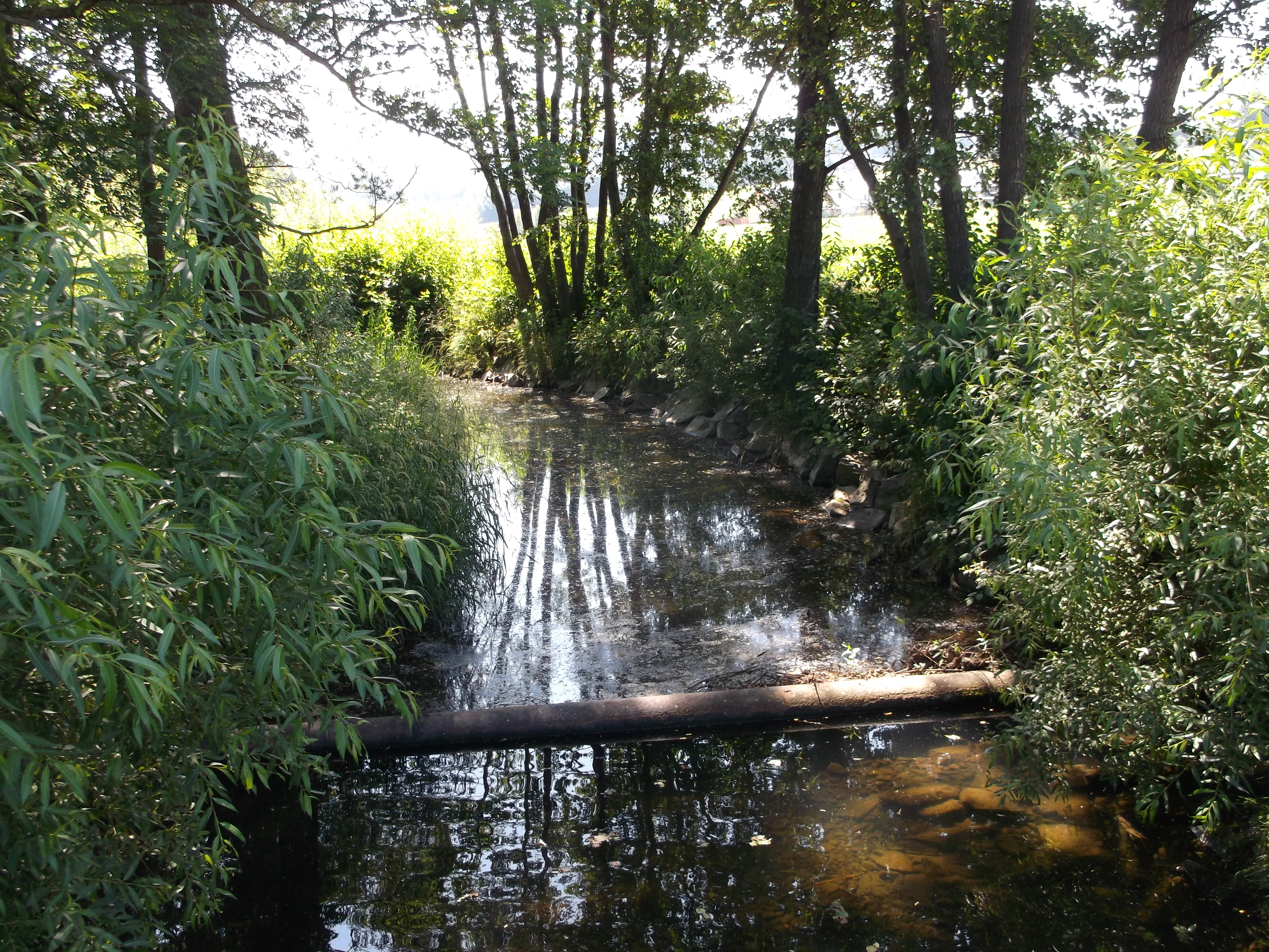 Baštice před VN Baška